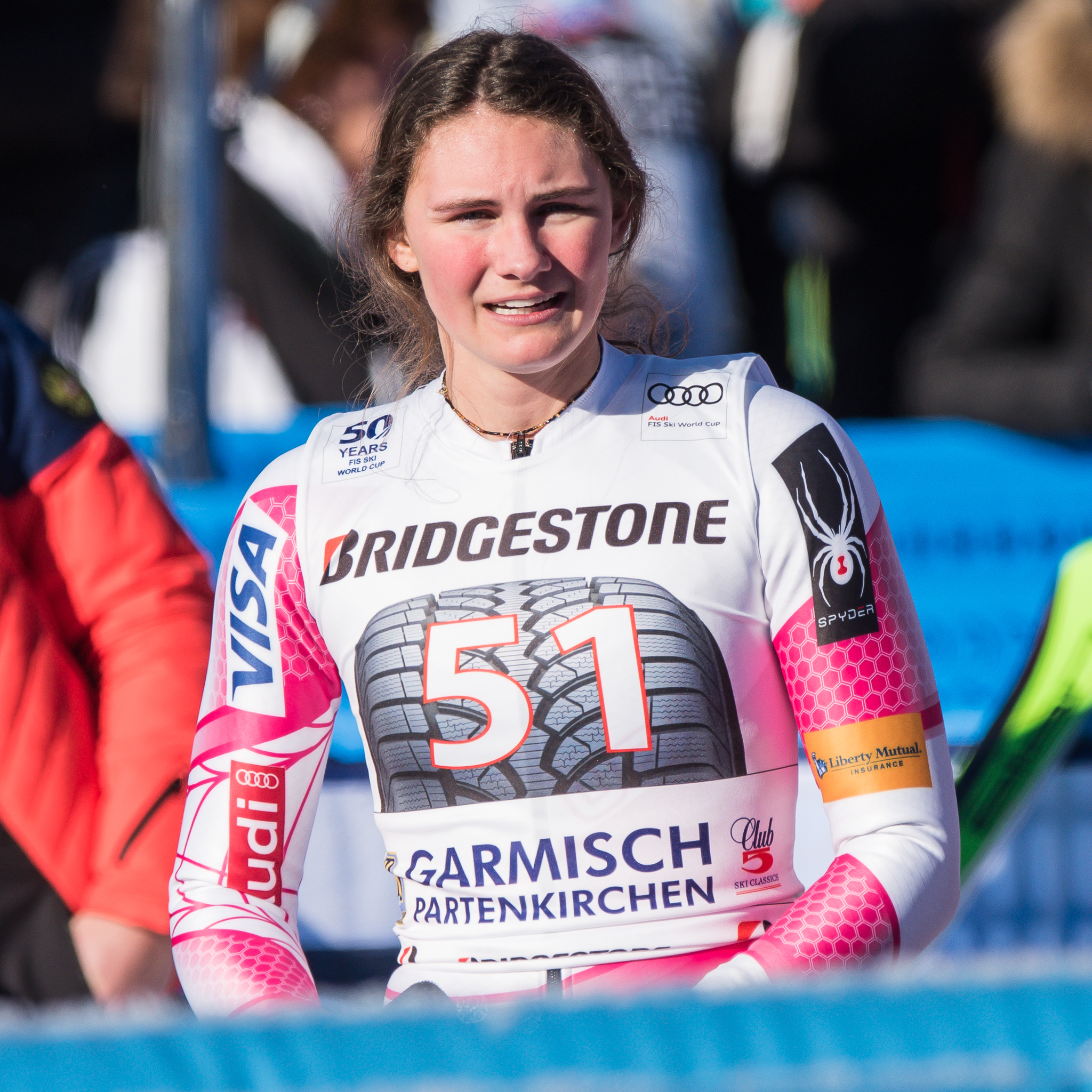 64. Kandahar Rennen,Alice Merryweather,Audi FIS Ski Weltcup Garmisch-Partenkirchen,Damen Super-G,Kandahar,Ladies Super-G